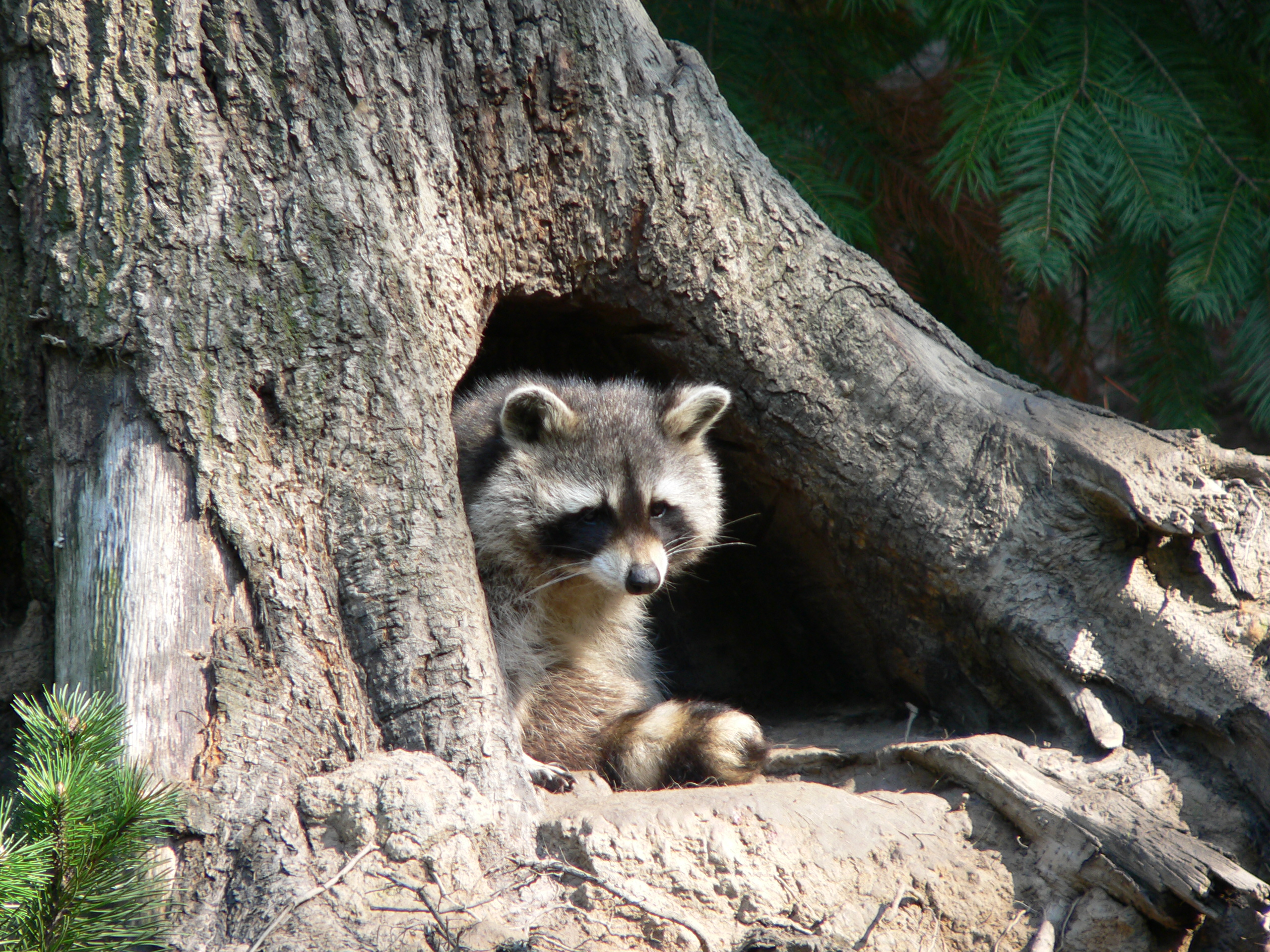 Waschbär (Procyon lotor)